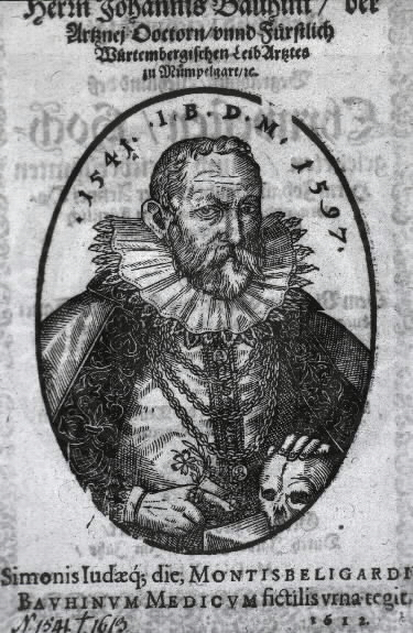 French botanist Johann Bauhin (1541-1612)